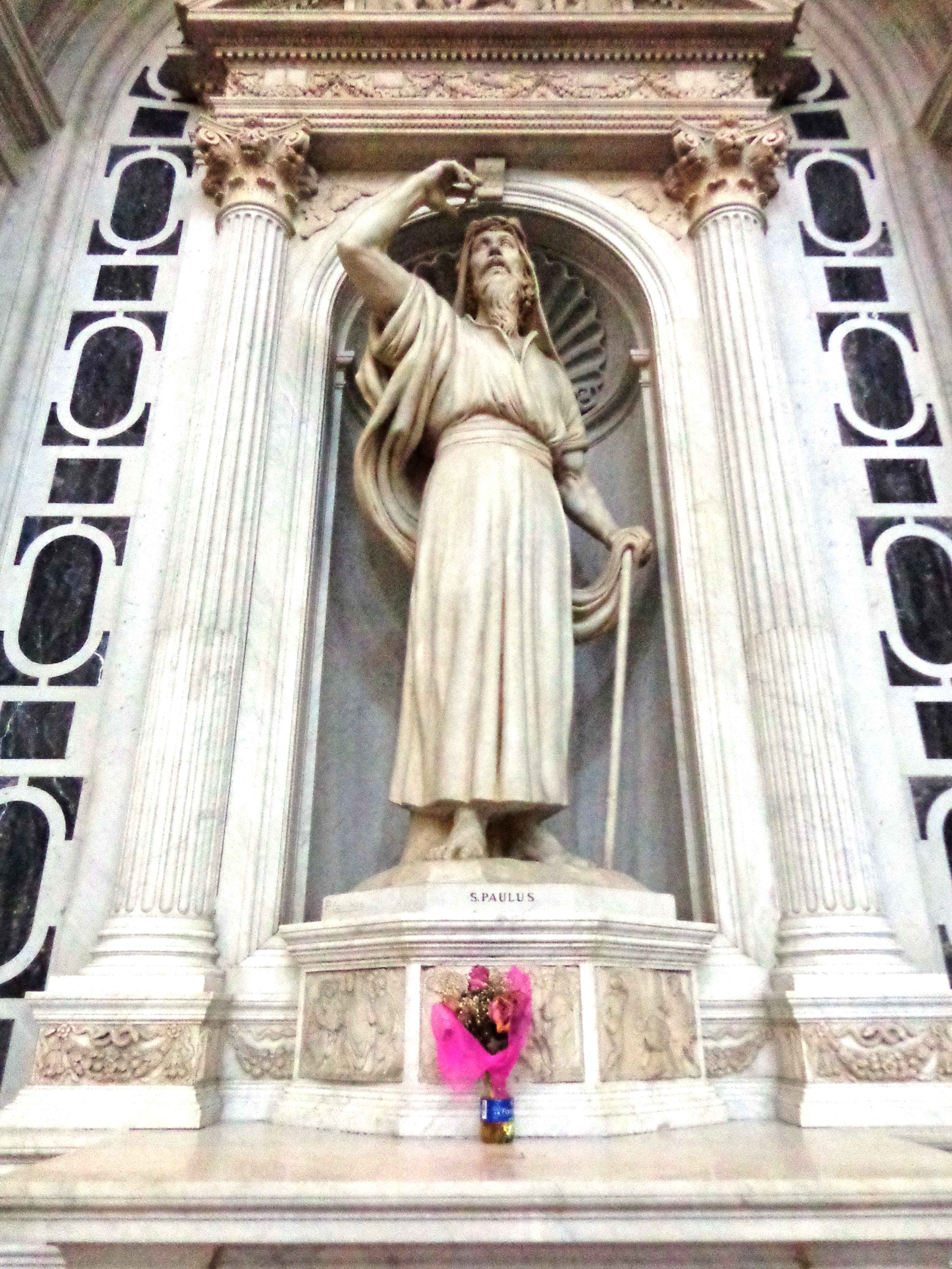 Duomo_ME_06